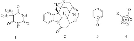 1. Веронал, 2. Стрихнин, 3. Пиридин N-оксид, 4. Мезоионный синдон Бейкера